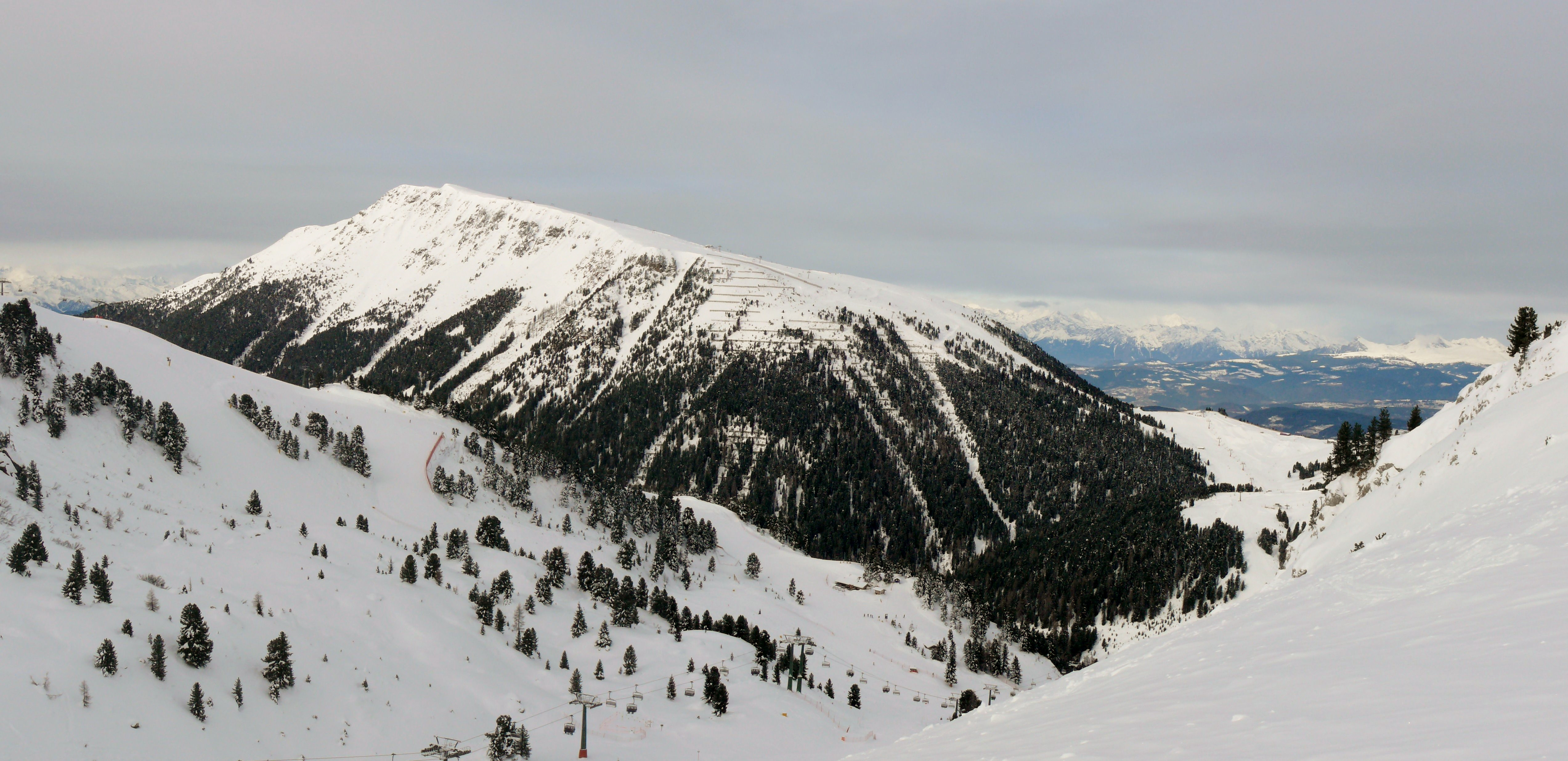 Pala di Santa during the winter